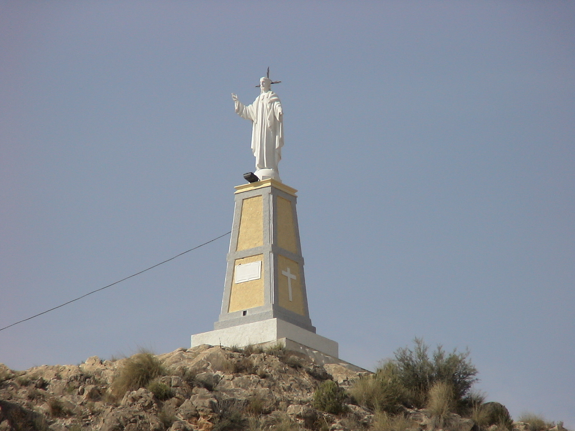 Barinas